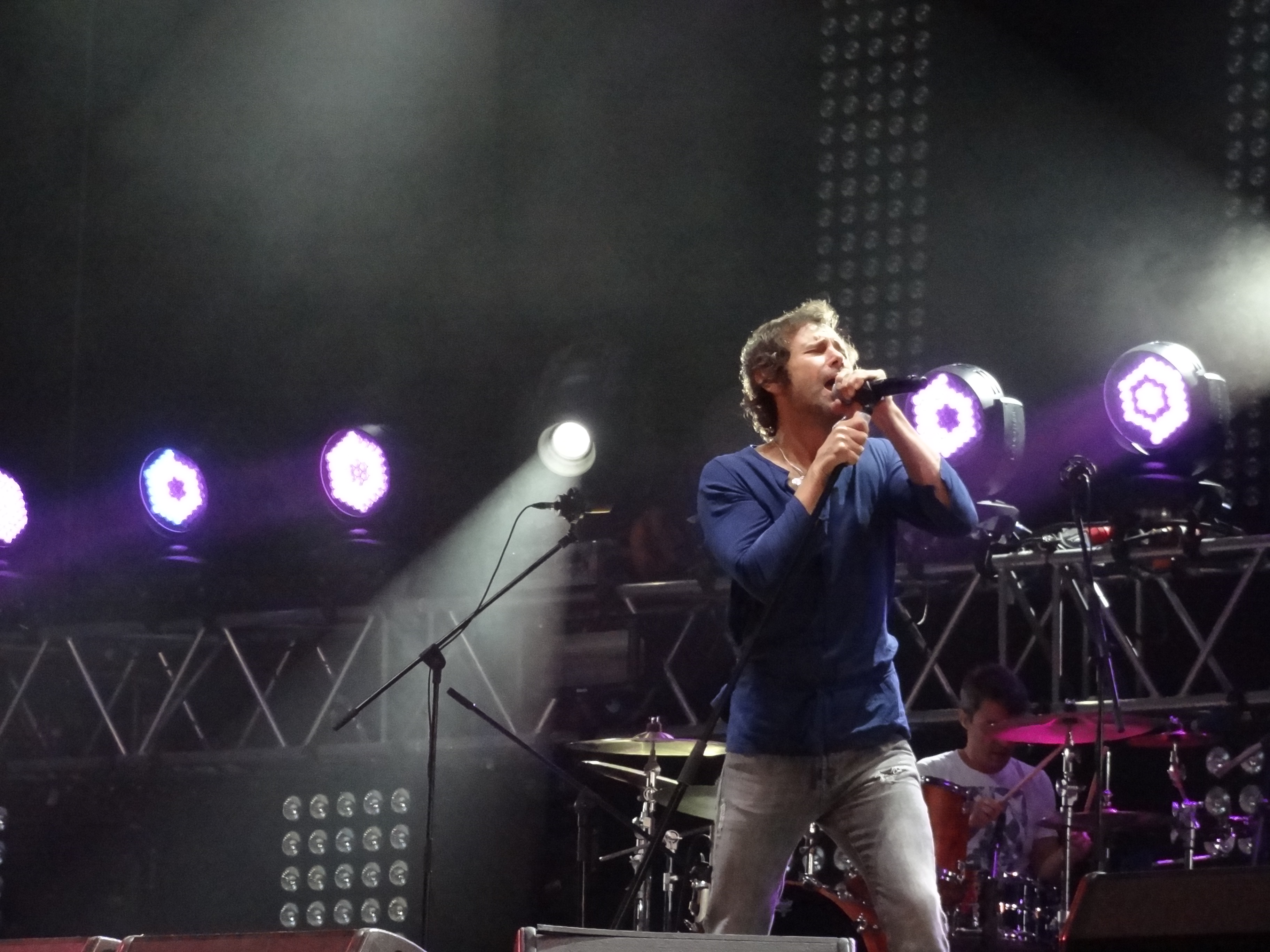 Концерт в рамках XI Международного инвестиционного форума «Сочи – 2012» .